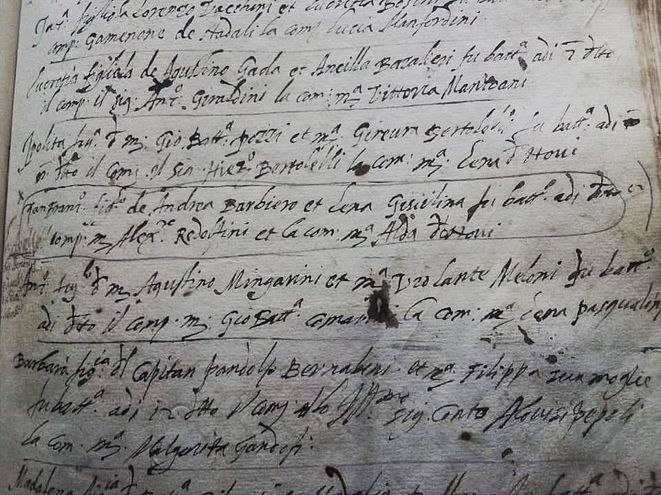 Estratto del registro in cui compare l'atto di battesimo del Guercino